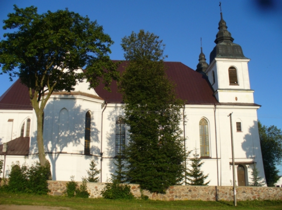 Mały Płock - kosciół parafialny p.w. Znalezienia Krzyża (zabytek nr A-383 z 31.01.1989)